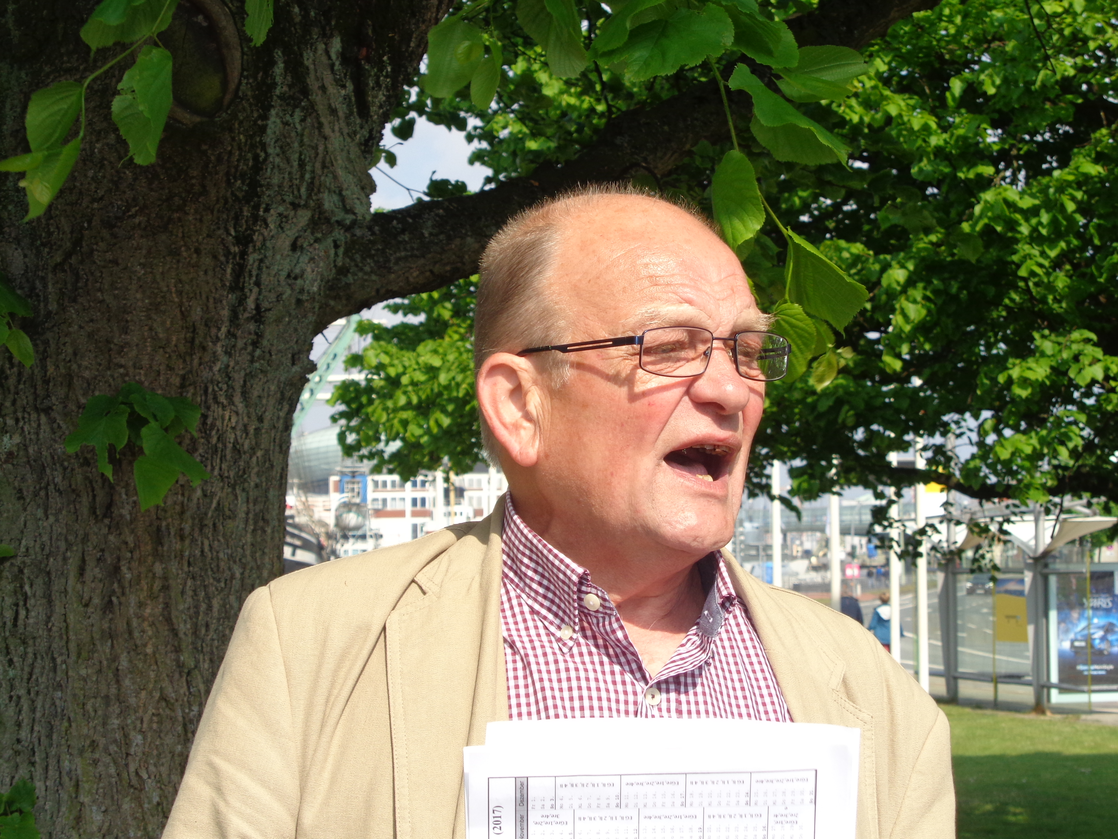 Peter Raap im Alten Hafen, Bremerhaven